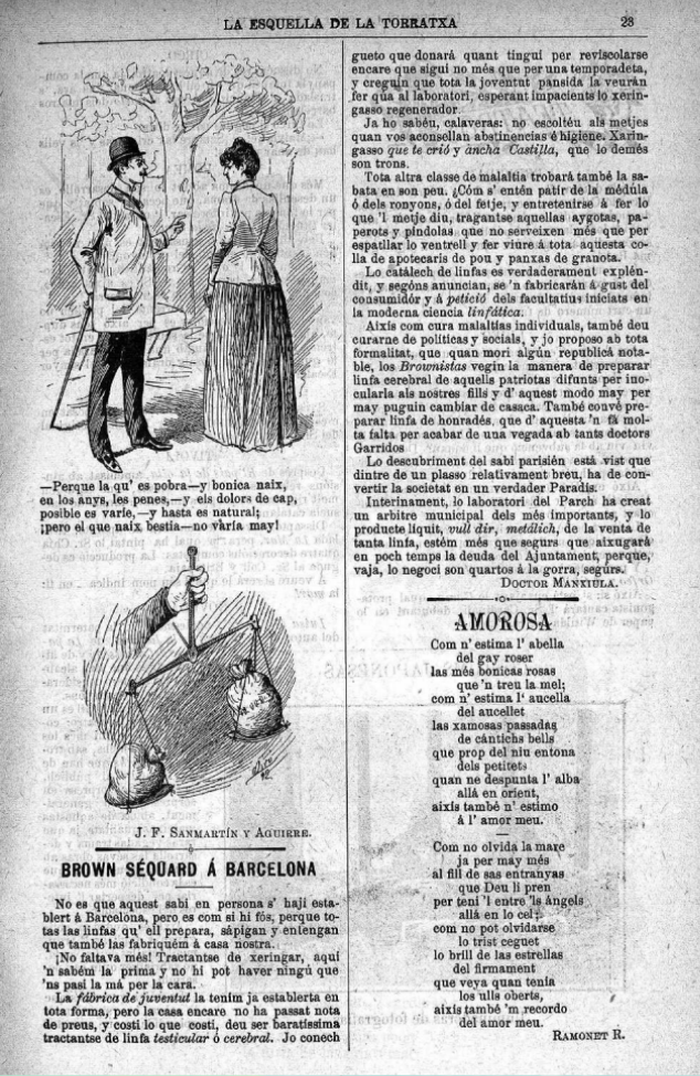 Página de la revista La Esquella de la Torratxa